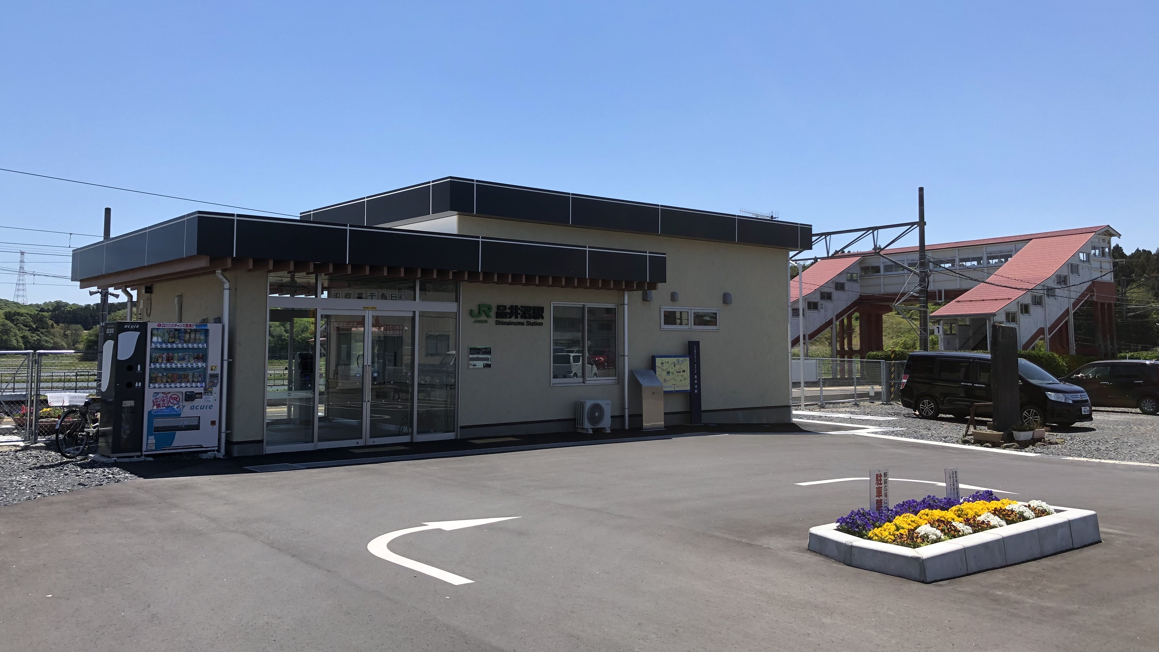 JR東日本 東北本線 品井沼駅